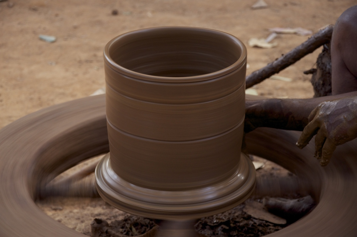 பானை செய்யும் சக்கரத்தில் பாதி முடிக்கப்பட்ட பானை